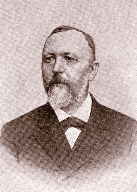 Richard von Krafft-Ebing (1840-1902)